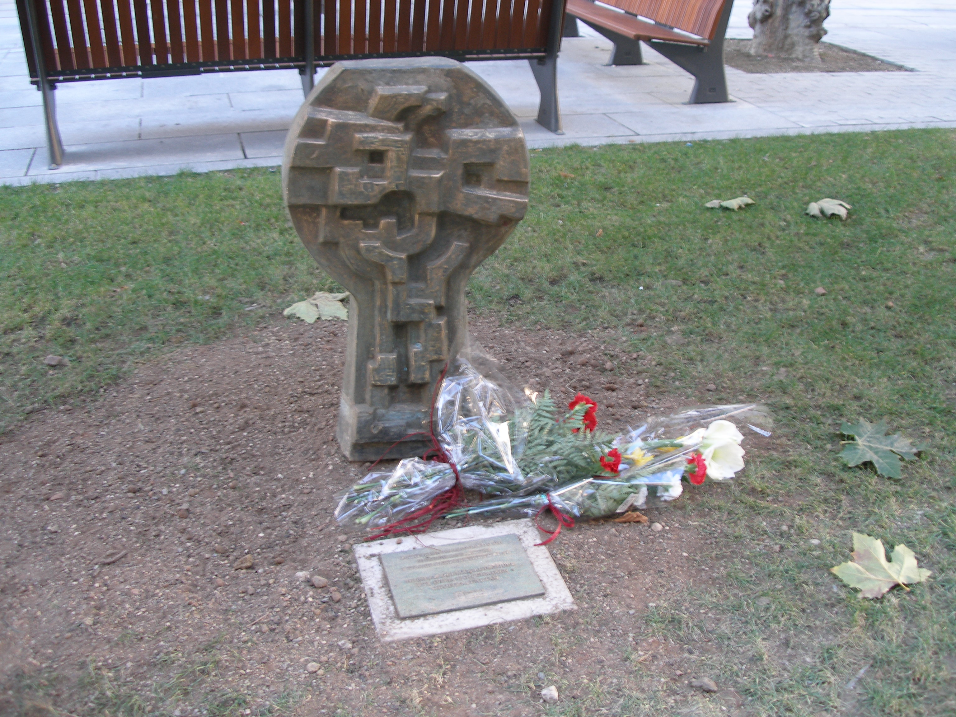 Estela de los Sucesos de Sanfermín 1978